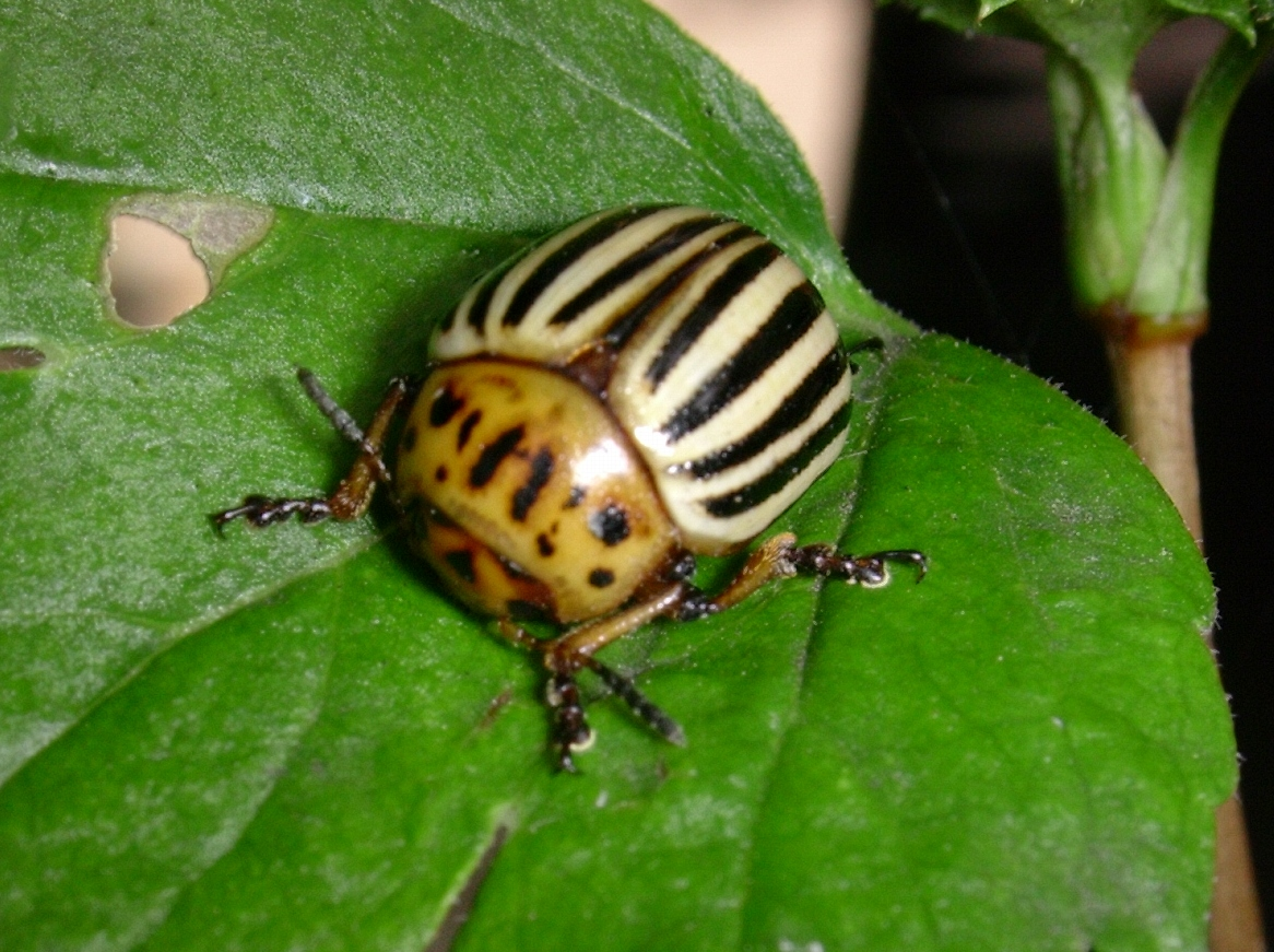 Kartoffelkäfer